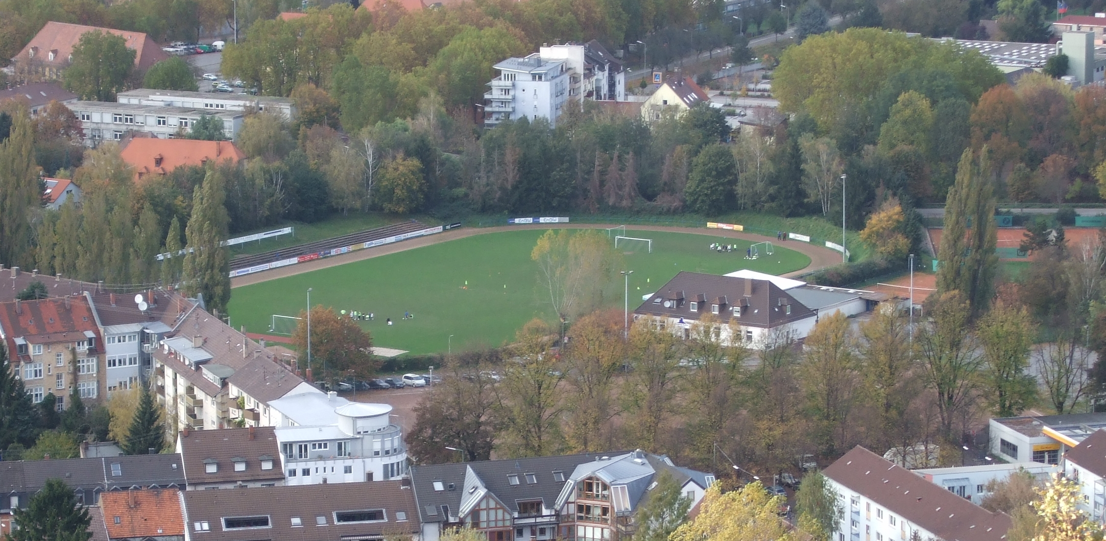 ASV Durlach vom Turmberg aus aufgenommen